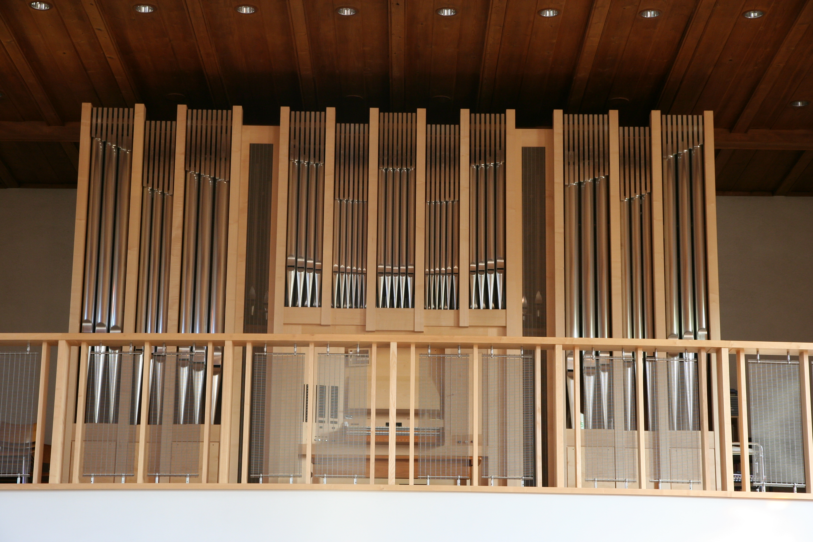 Römisch-katholische Pfarrkirche St. Verena Stäfa